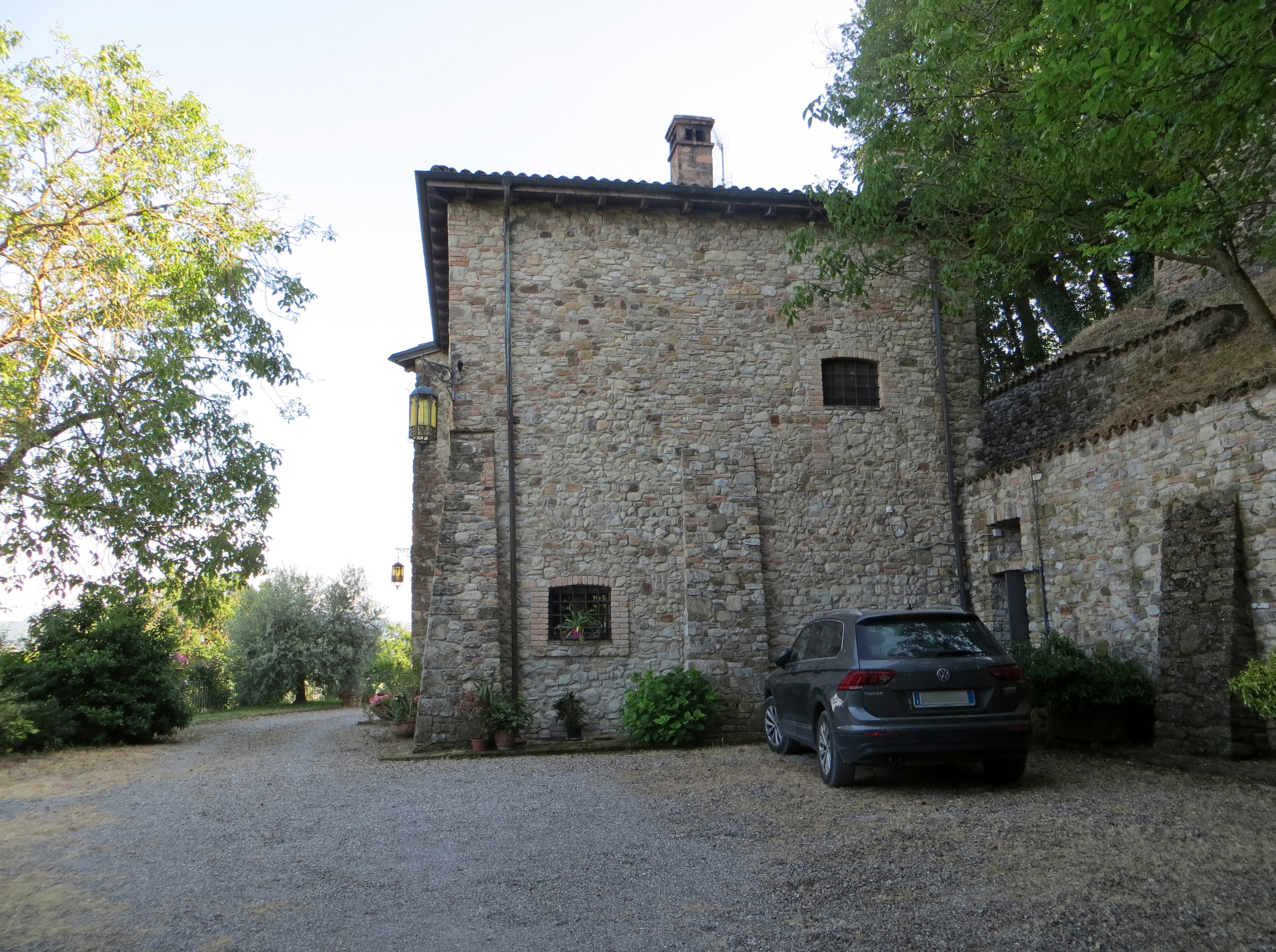 Castello di Guardasone (Traversetolo) - edifici annessi